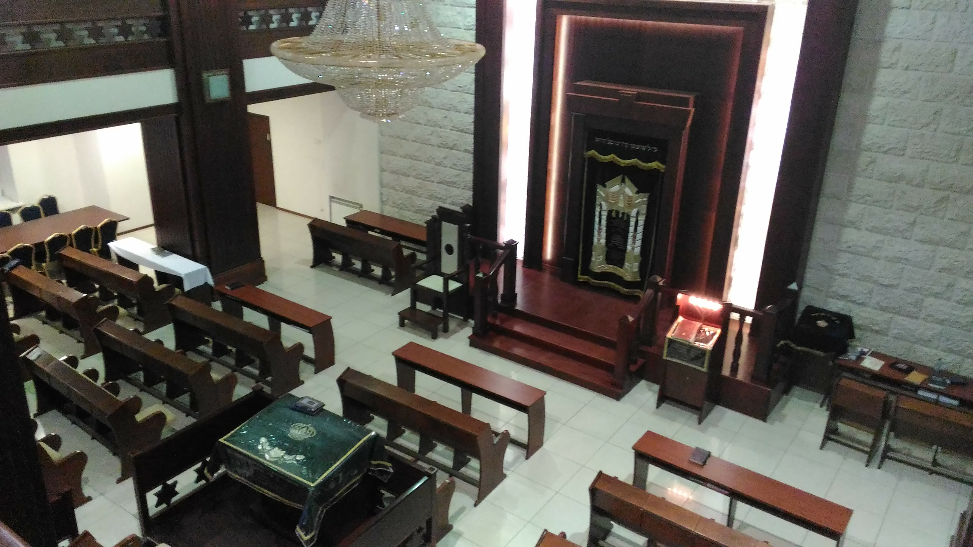 Молельный зал Нижегородской синагоги. На фото - Ковчег со свитками Торы и мужская половина зала с бимой, а также стол для занятий (слева).